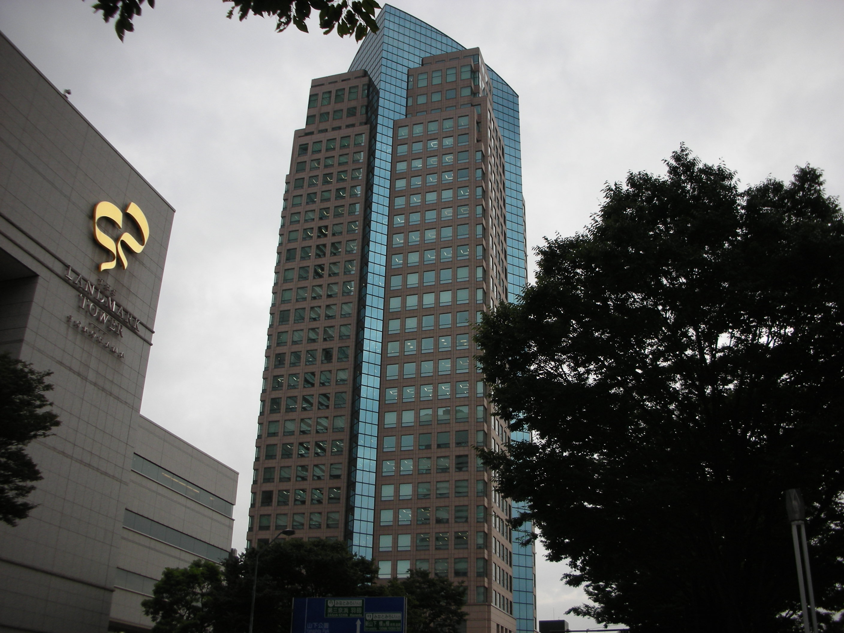 2006/9/4におんさかが撮影。神奈川県横浜市横浜銀行本店